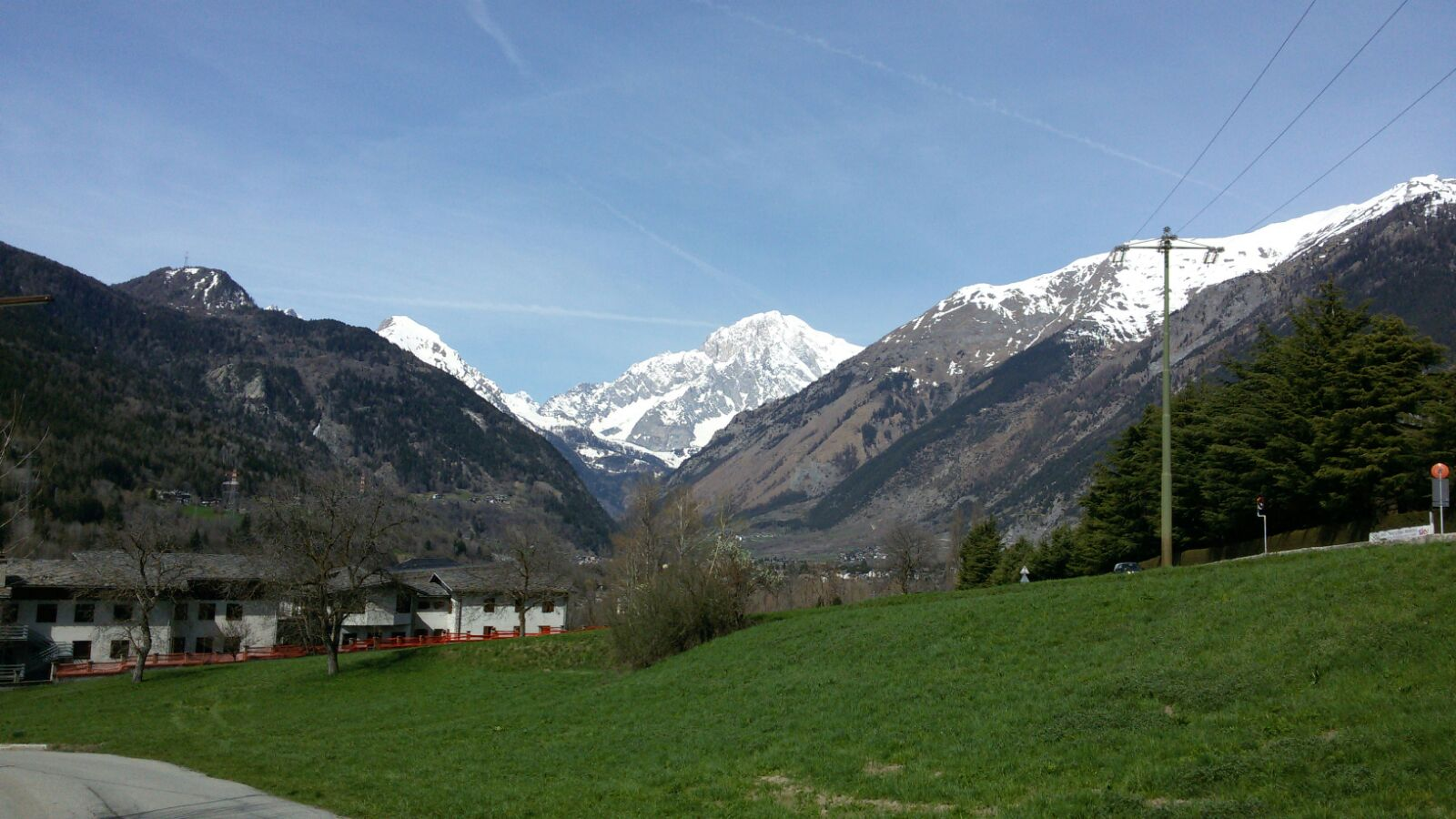 Le Mont Blanc vu de La Salle (Vallée d'Aoste)